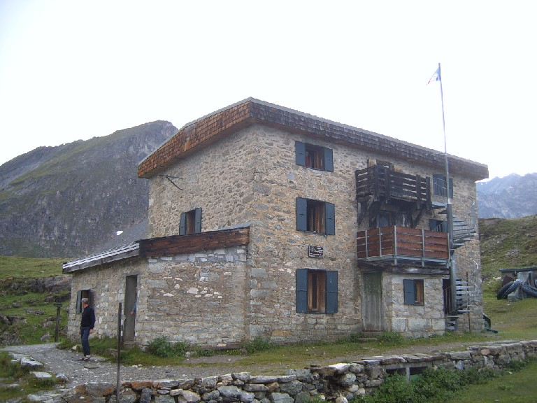 Refuge du Col de la Vanoise, Pralognan-la-Vanoise.